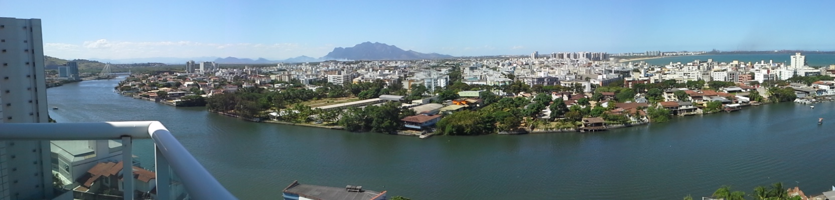 Canal de vitória, com bairro jardim da Penha ao fundo,E.S.